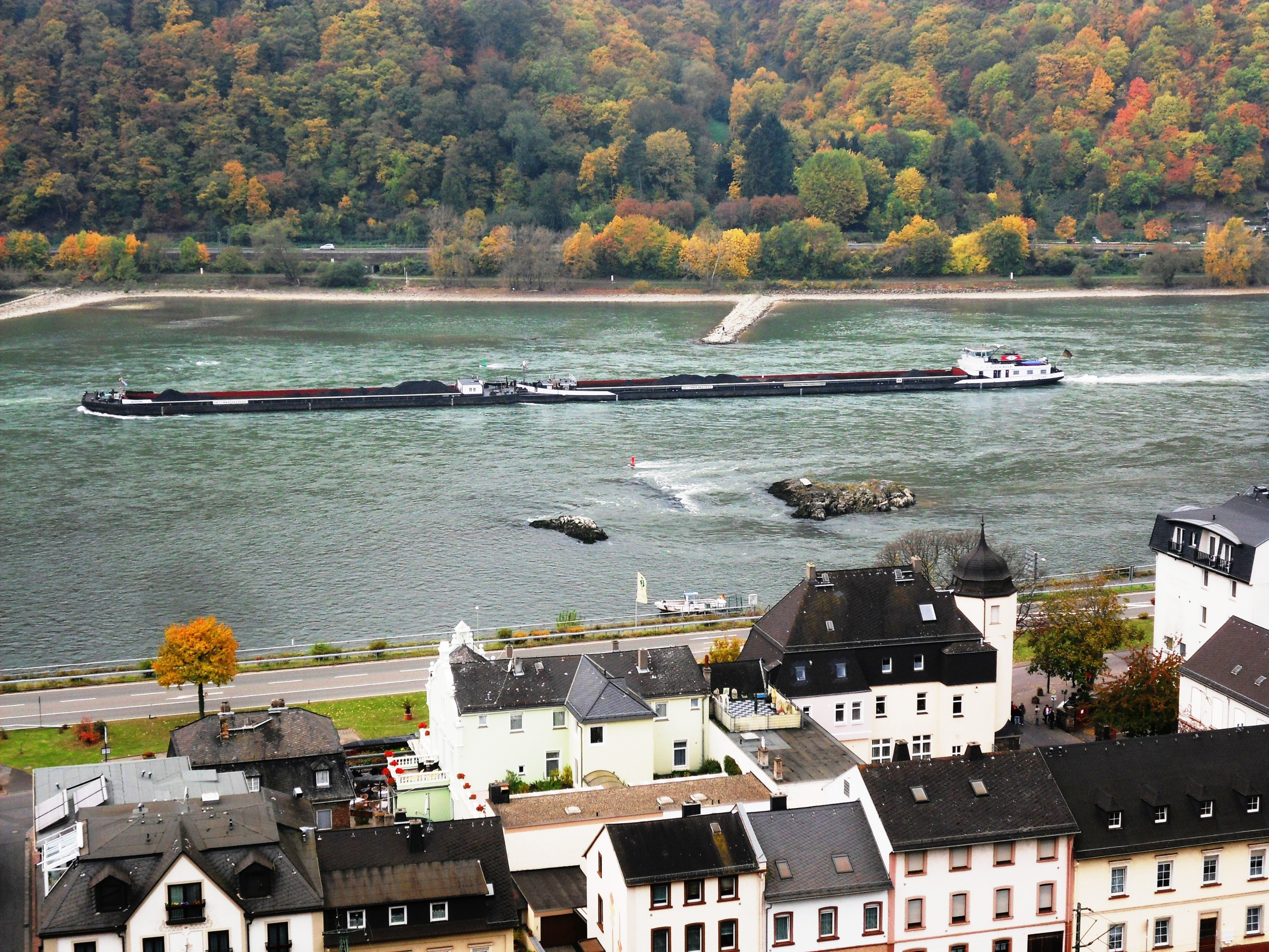 Blick von der Weinlage Frankenthal über Assmannshausen auf den Rhein mit dem Felsenriff Großer und Kleiner Leisten, den gerade ein Gütermotorschiff im Schubverband mit einer Ladung Schüttgut auf Bergfahrt passiert